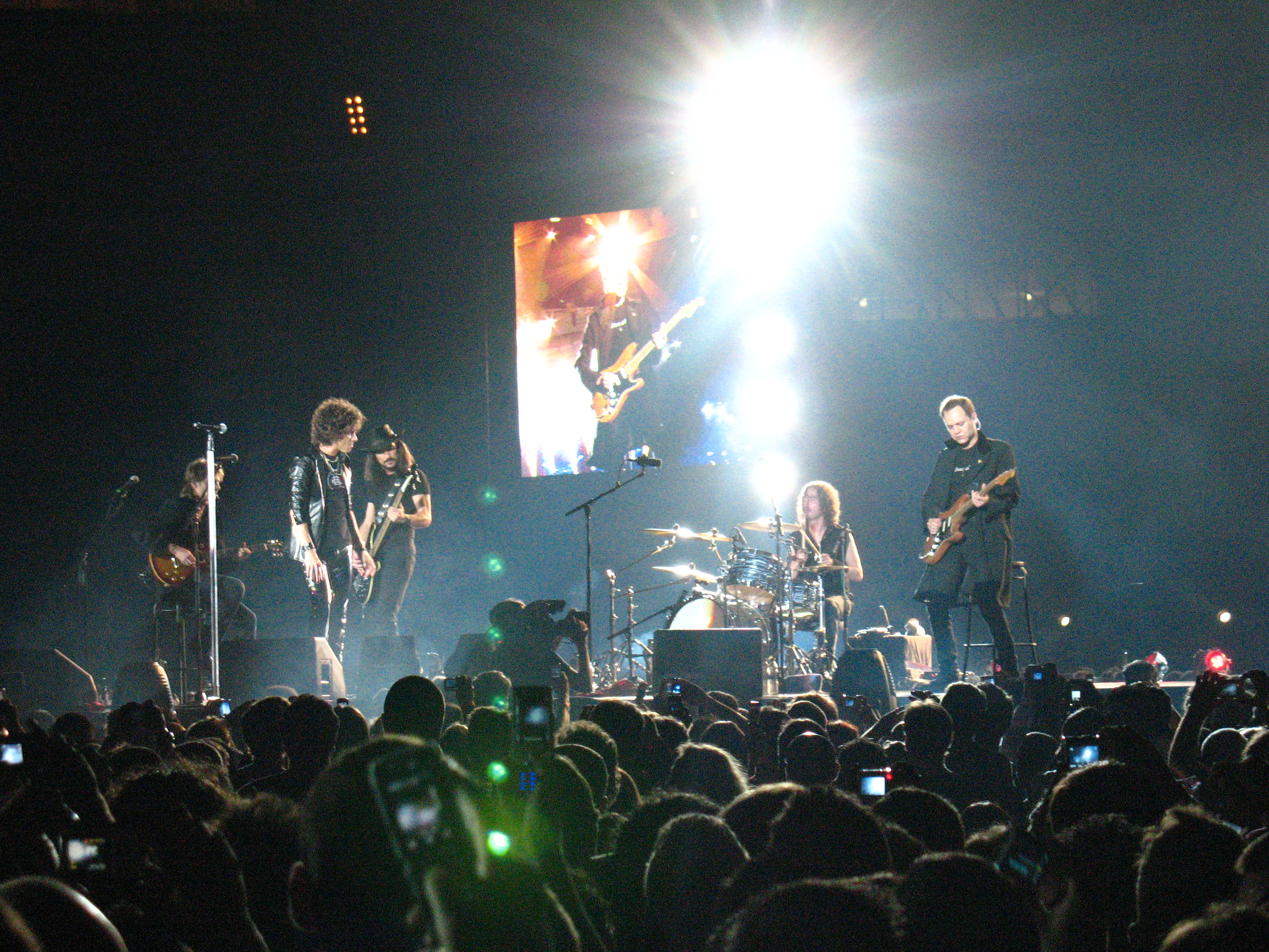 Heroes del Silencio concierto Sevilla